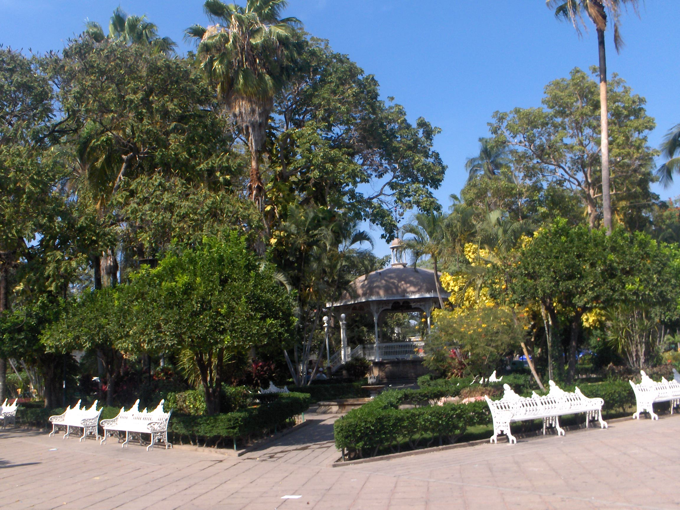 Jardin Libertad, Colima